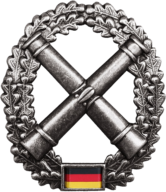 Barettabzeichen der Artillerietruppe der Bundeswehr Barettfarbe: Korallenrot Maße: Hoch: 53mm Breit: 46mm Ausführung: altsilber, Metall